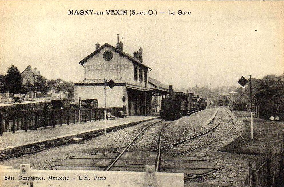 Train de voyageurs après l'arrivée depuis Chars.